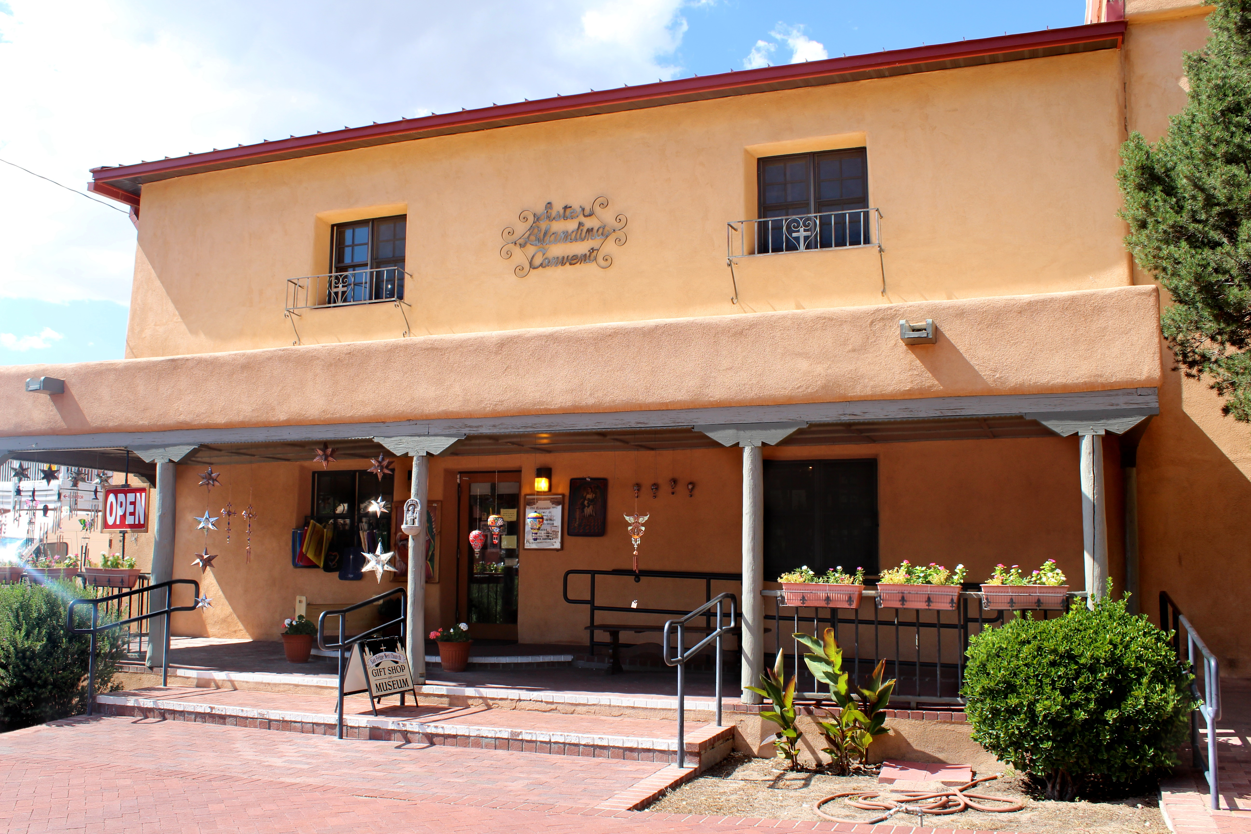 Albuquerque, New Mexico USA